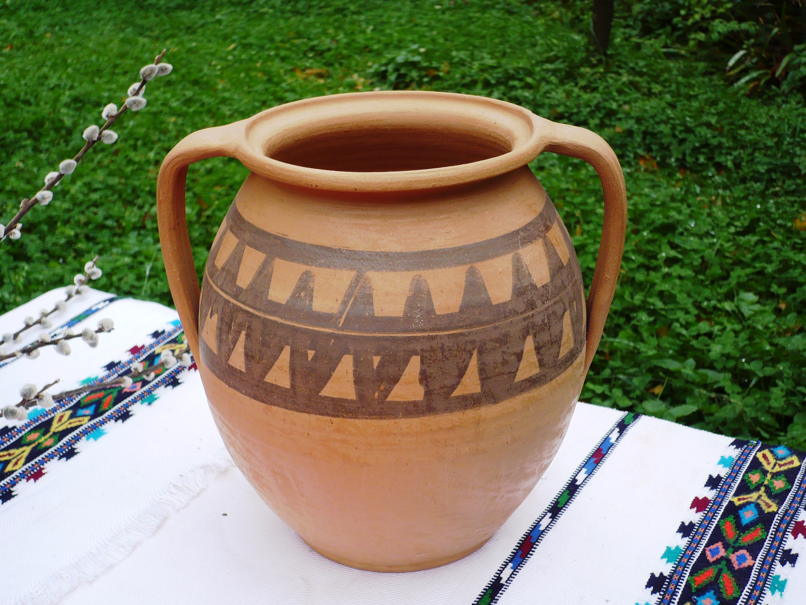 ceramica Sacel